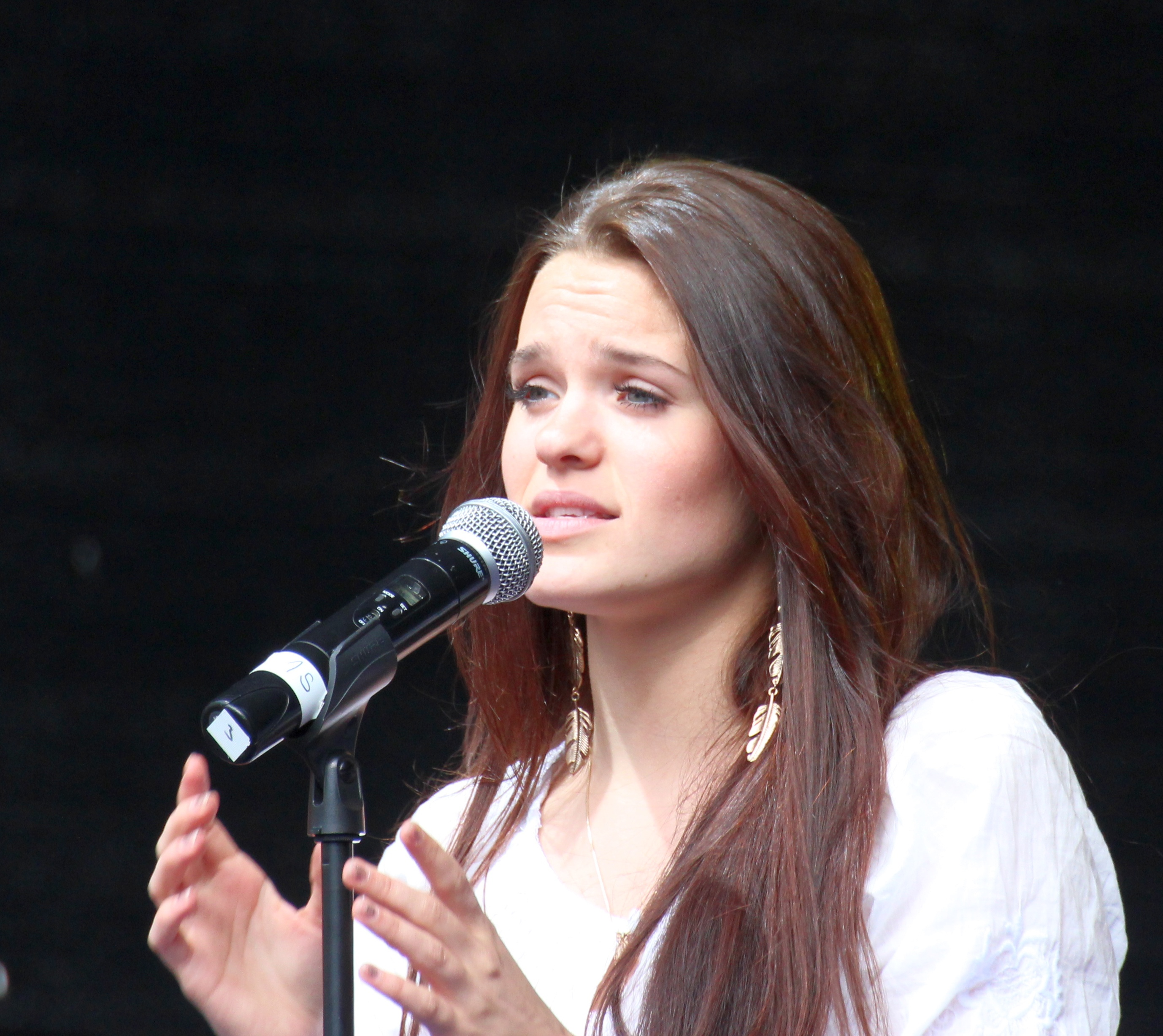 Getter Jaani esinemas Tallinnas Raekoja platsil.